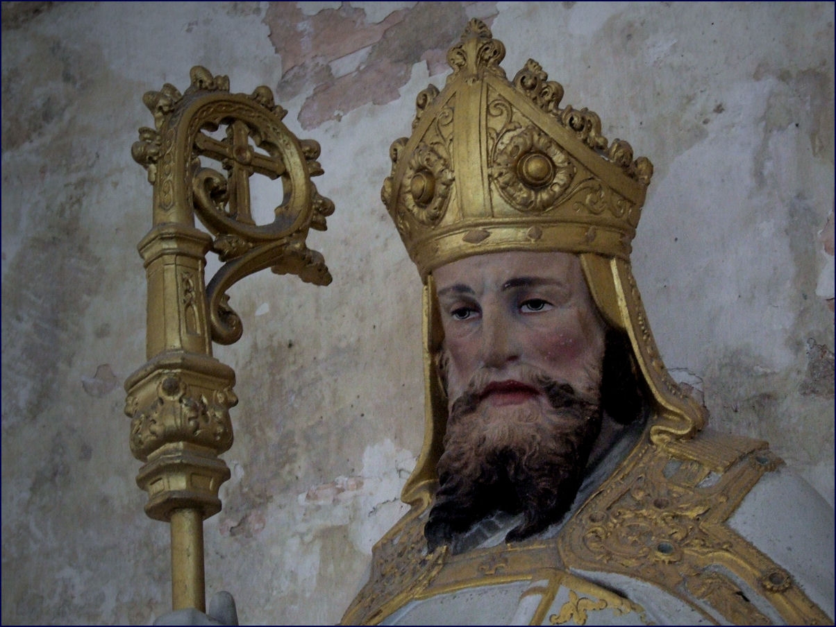 St. Pierre es Liens, Mussy-sur-Seine, France